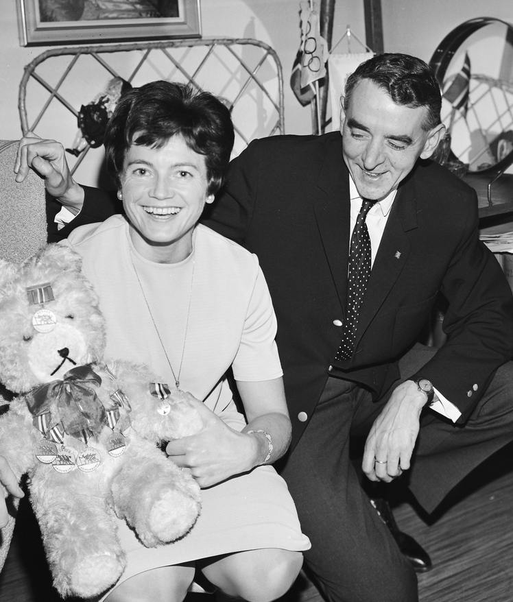 Ingrid and Leif Wigernæs